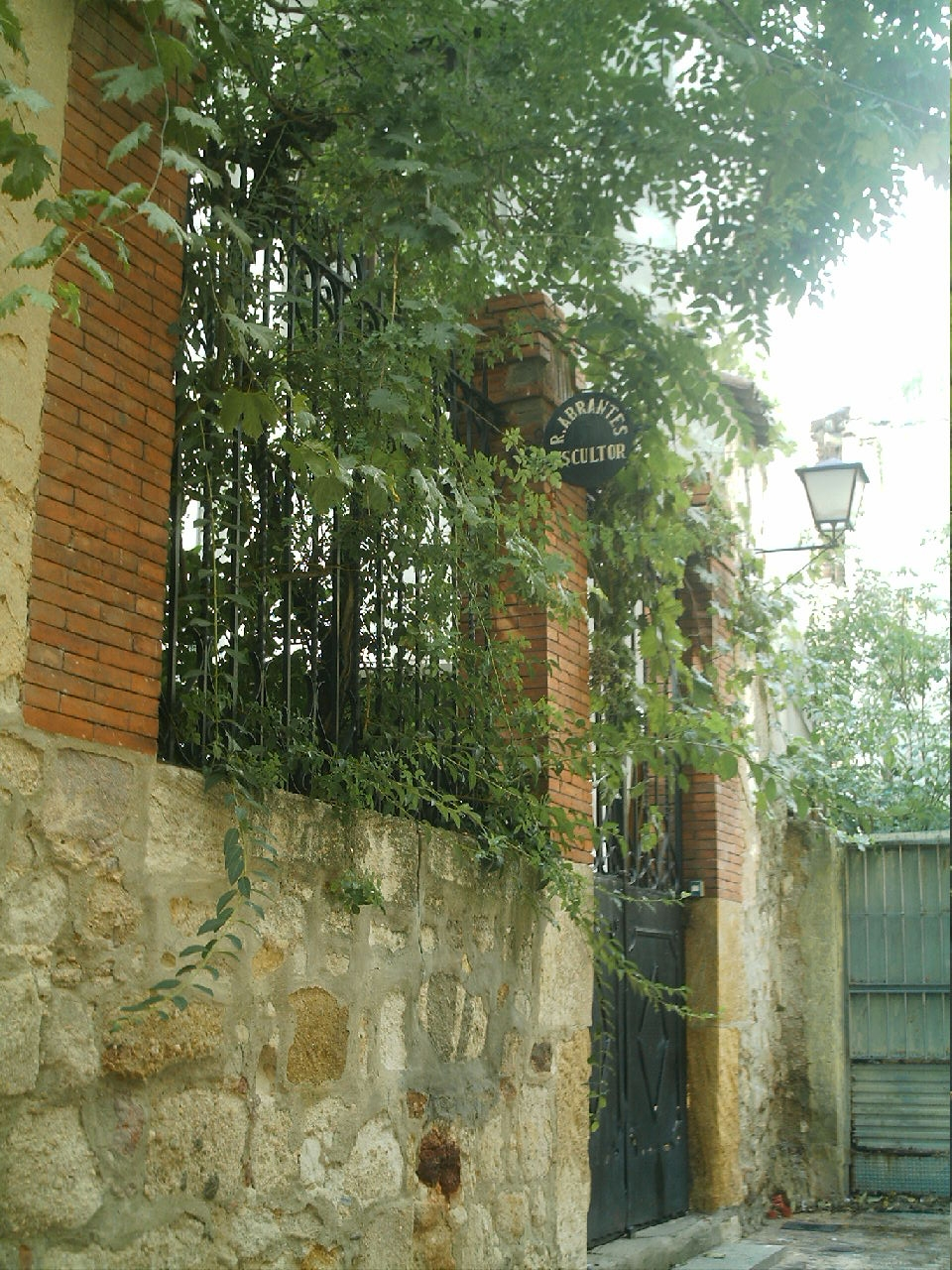 Taller del escultor zamorano Ramón Abrantes.